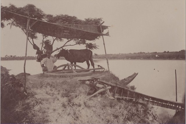 这幅图是1870年拍摄的相片，受到维基百科合理使用内容方针的严格规定，但有鉴于： 用于说明一篇关于该标志所代表实体的教育性百科全书条目。 条目主题的视觉辨识是该图像使用的首要目的。 这是一幅低分辨率的图像，因此不适于他人进行伪造或仿冒。 标志不以误导读者认为条目是由该标志所有者书写或授权的方式使用。 从教育价值上进行比较，不能以无版权或自由的图像替换该图像。